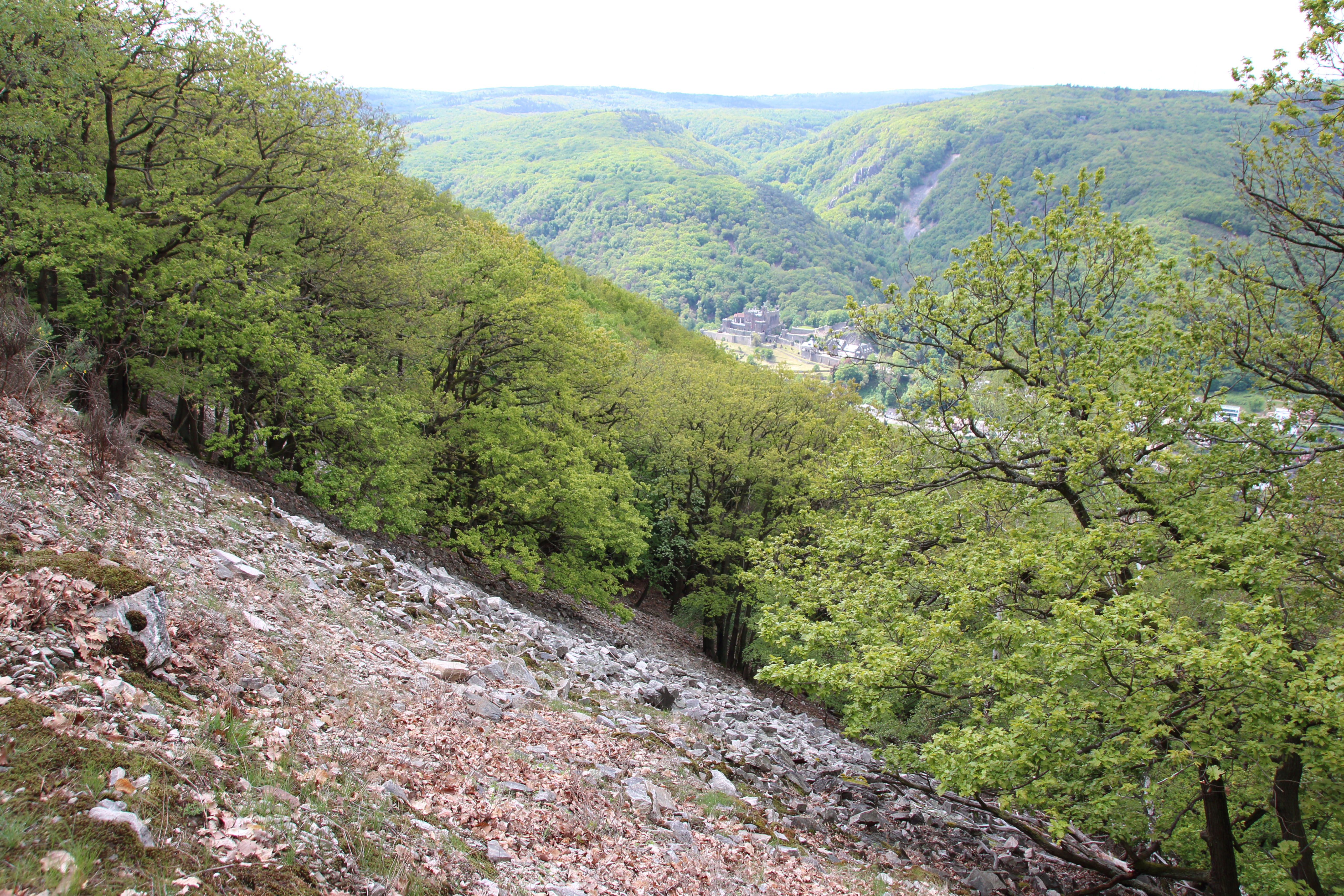 NSG Teufelskadrich bei Lorch. Das ca. 380 ha große Waldstück liegt im Taunus zwischen Assmannshausen und Lorch im Rheingau. Hier: Stein­- und Blockschutthalde, auch Rossel genannt.